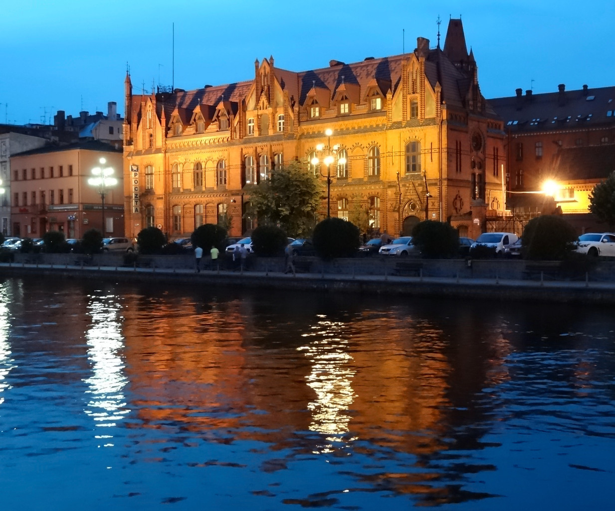 Budynek Poczty Głównej w Bydgoszczy przy ul. Jagiellońskiej (zbud. 1883 skrzydło płd, 1899 skrzydło płn)